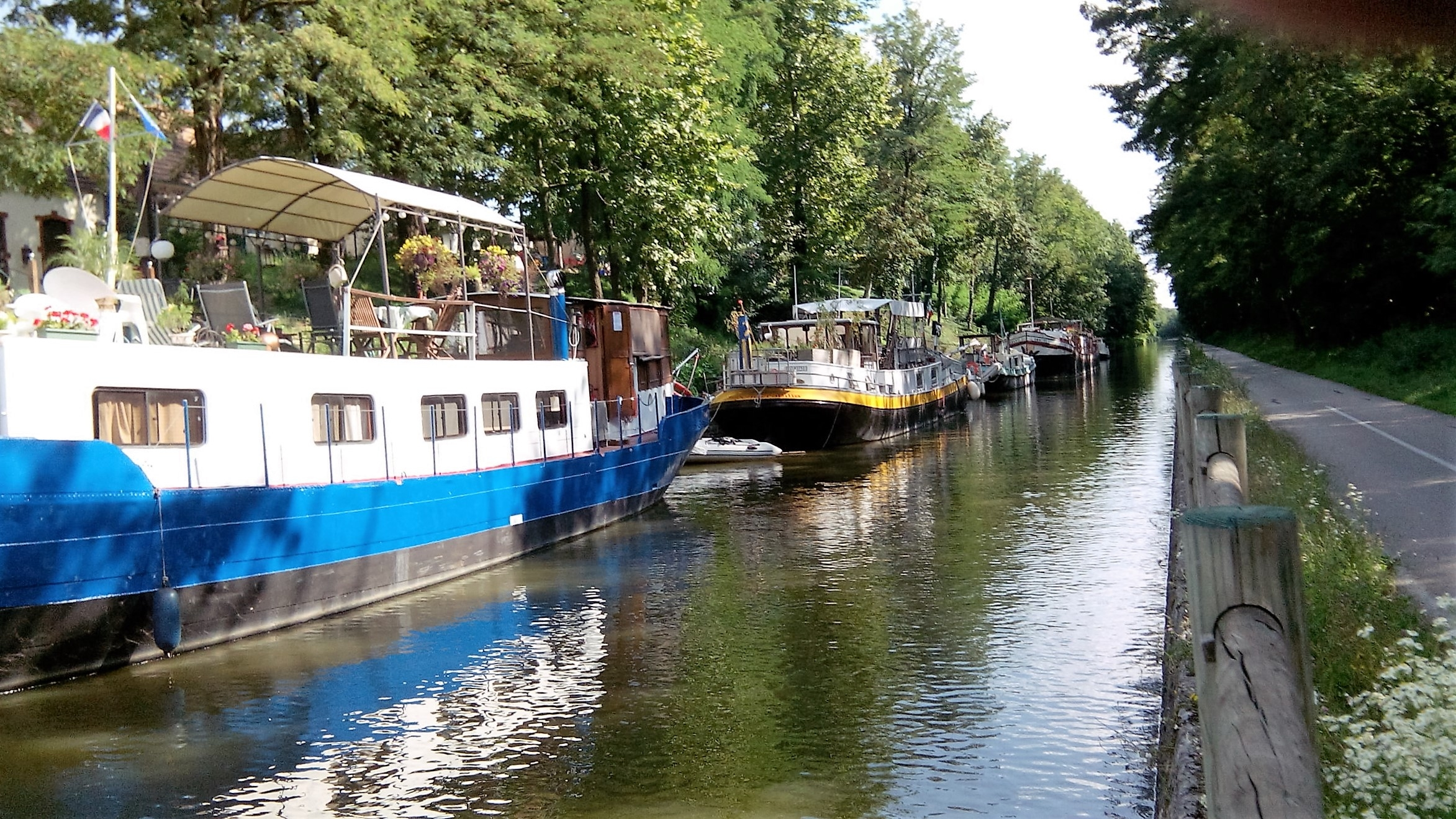 Chagny - Tranchée du Canal du Centre (Saône et Loire)